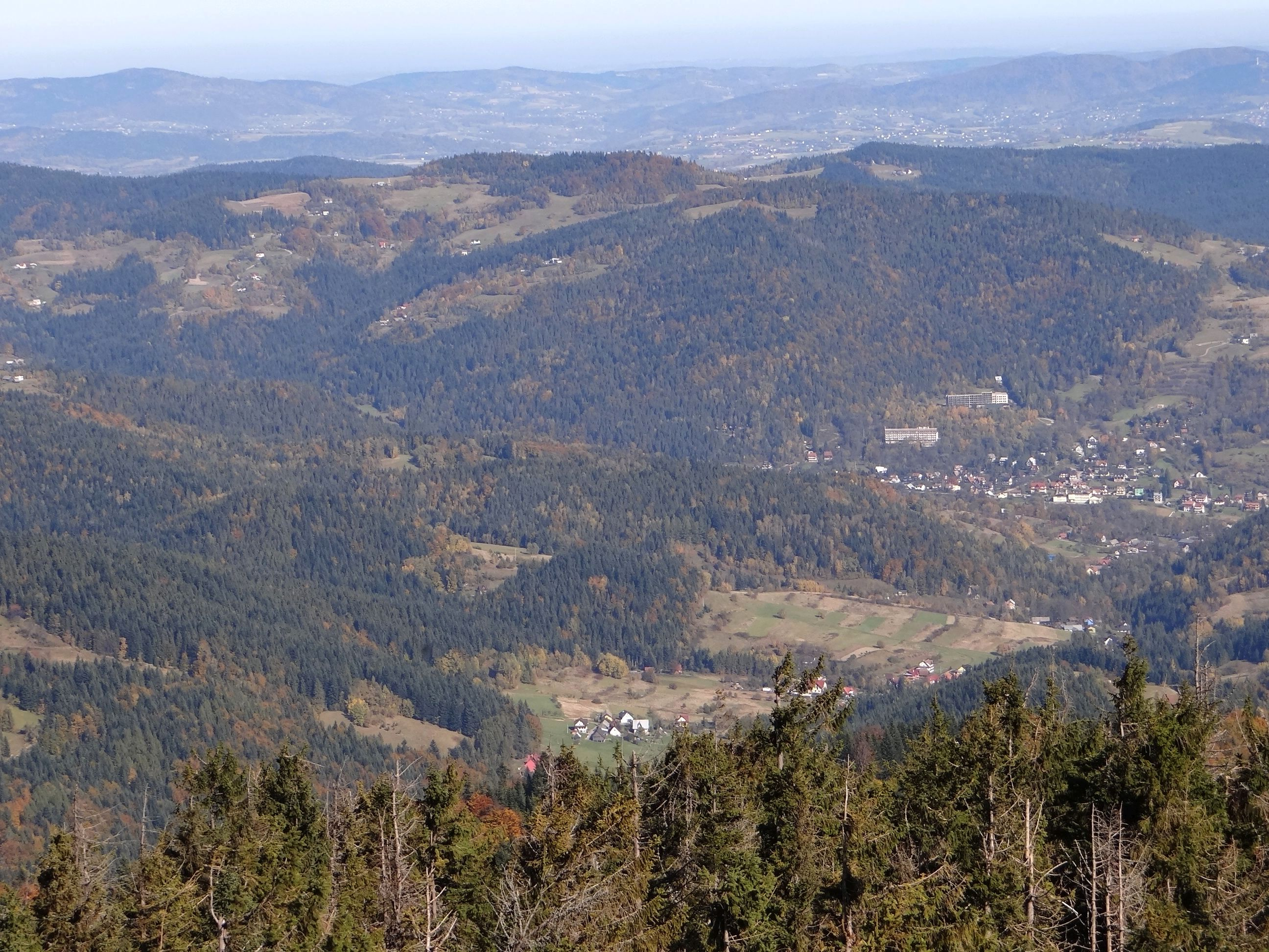 Widok z wieży widokowej na Gorcu na Szczawę i górę Hala